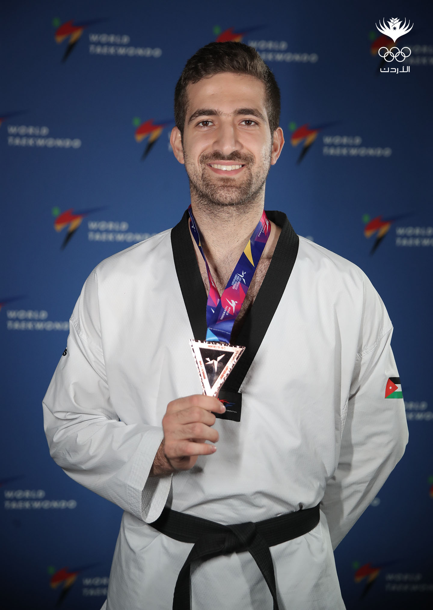 حمزة قطان من مواليد ١٩-٤-١٩٩٧ ، هو لاعب تايكواندو أردني ، يمثل حالياً المنتخب الأردني الأول للتايكواندو ، بدأ مسيرته في سن الثامنة ويدرس حالياً تخصص الحقوق